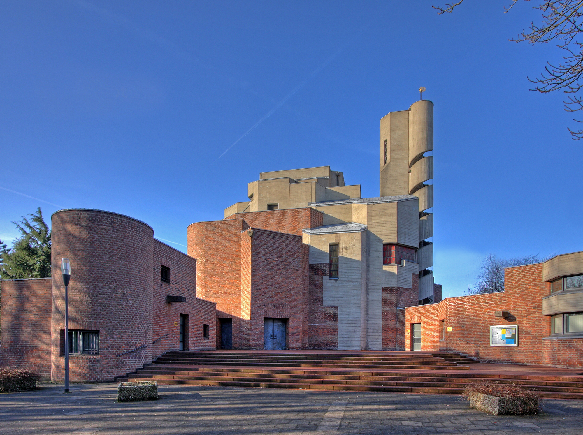 Kirche Christi Auferstehung in Köln-Lindenthal, Architekt: Gottfried Böhm.